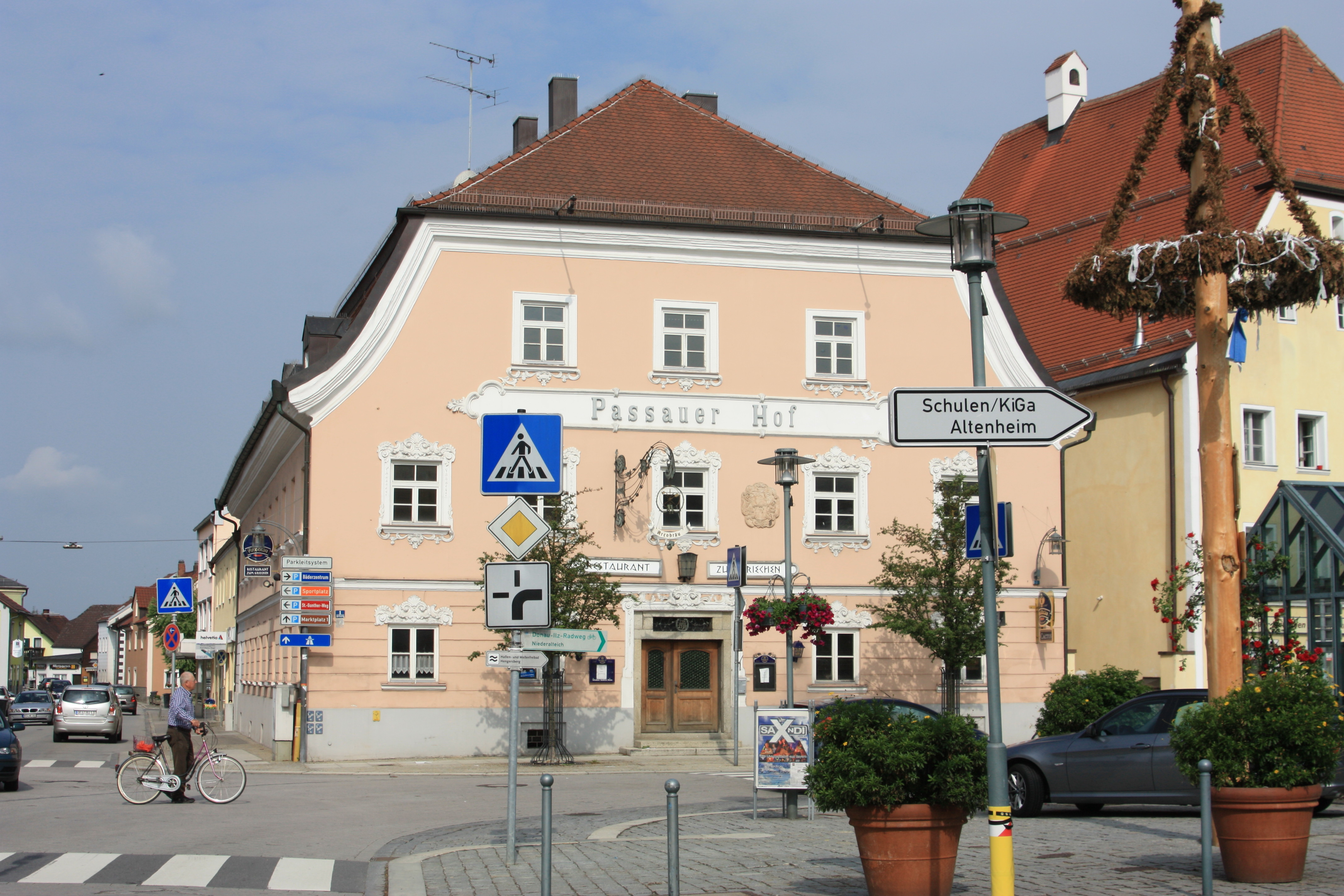 Gasthof, 1793, Dekor um 1900